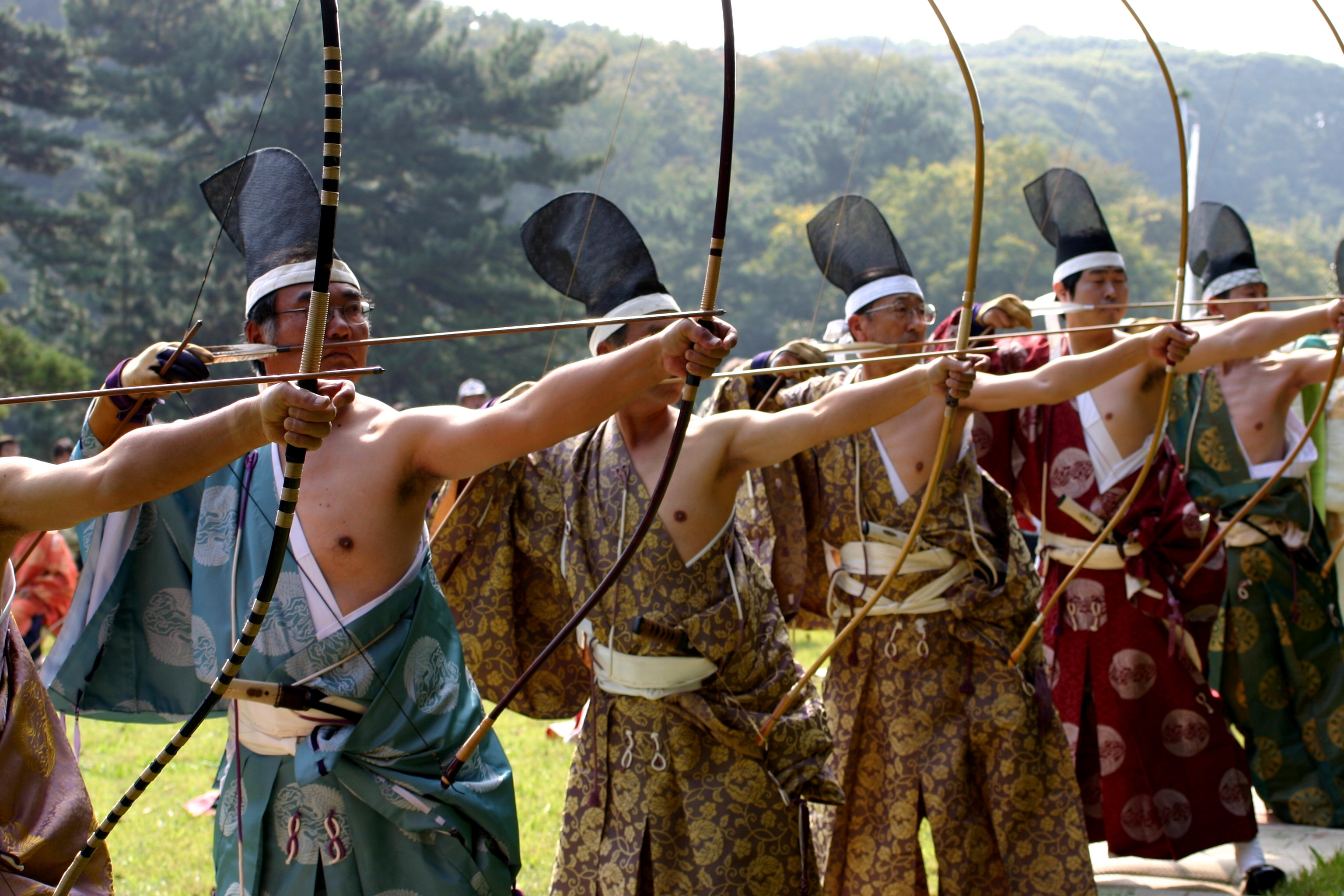 Tiratori di kyudo alla festa del 3 novembre al tempio Meiji di Yoyogi. Foto scattata da me a Tokyo il 3.11.06.